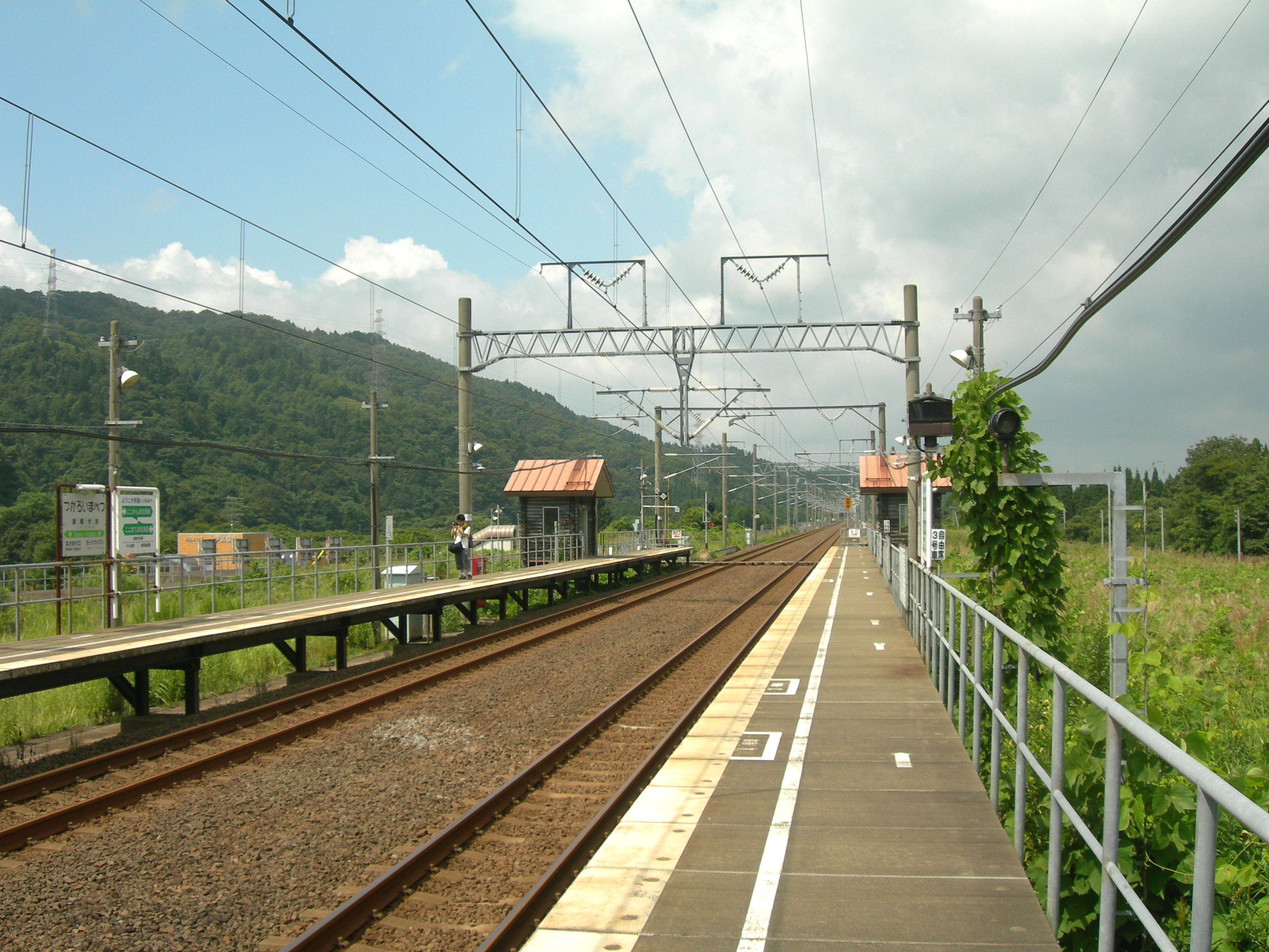 津軽今別駅ホームから木古内方向を見る